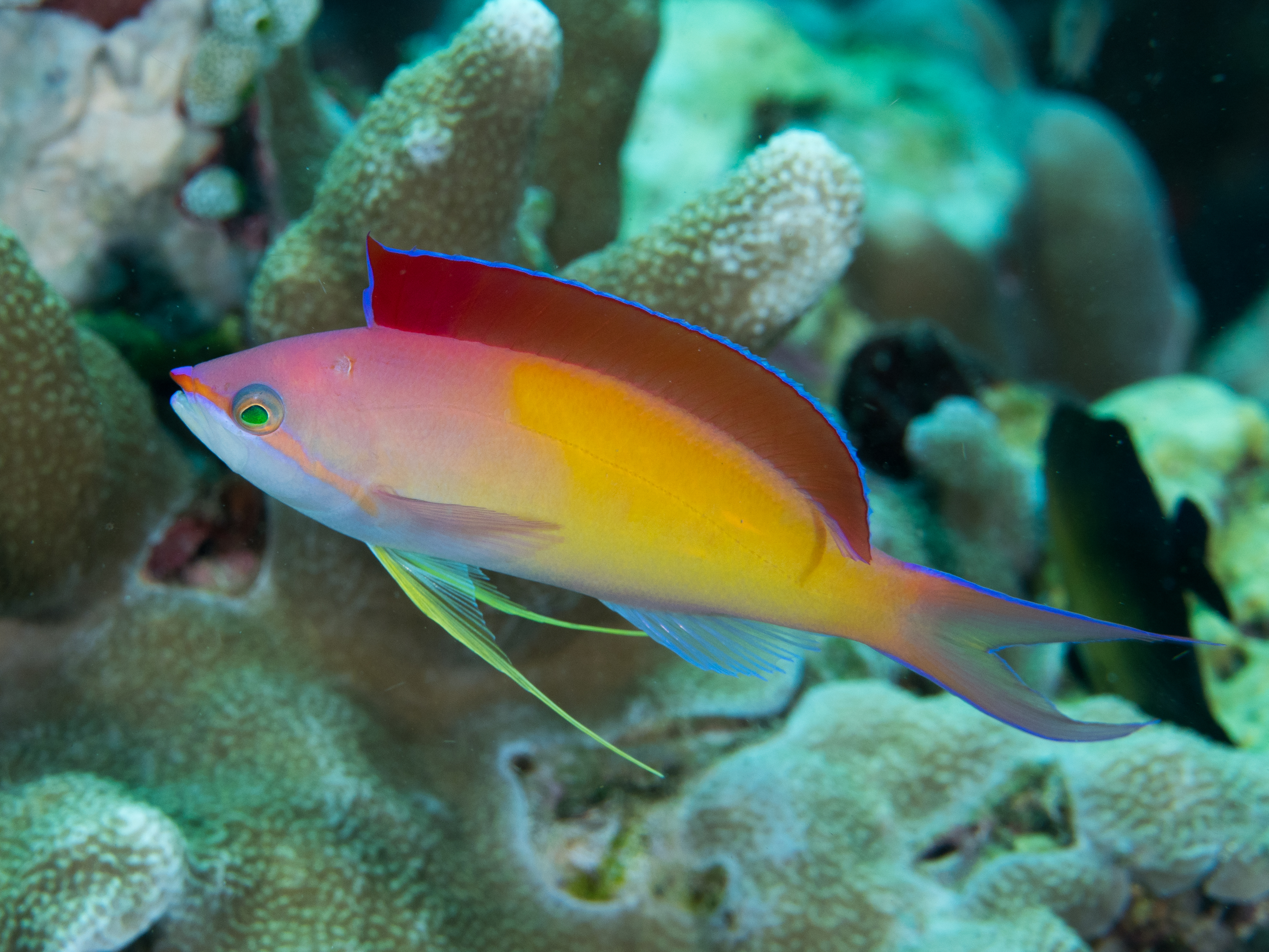 Morotai, Indonesia - Redfin anthias (Pseudanthias dispar)